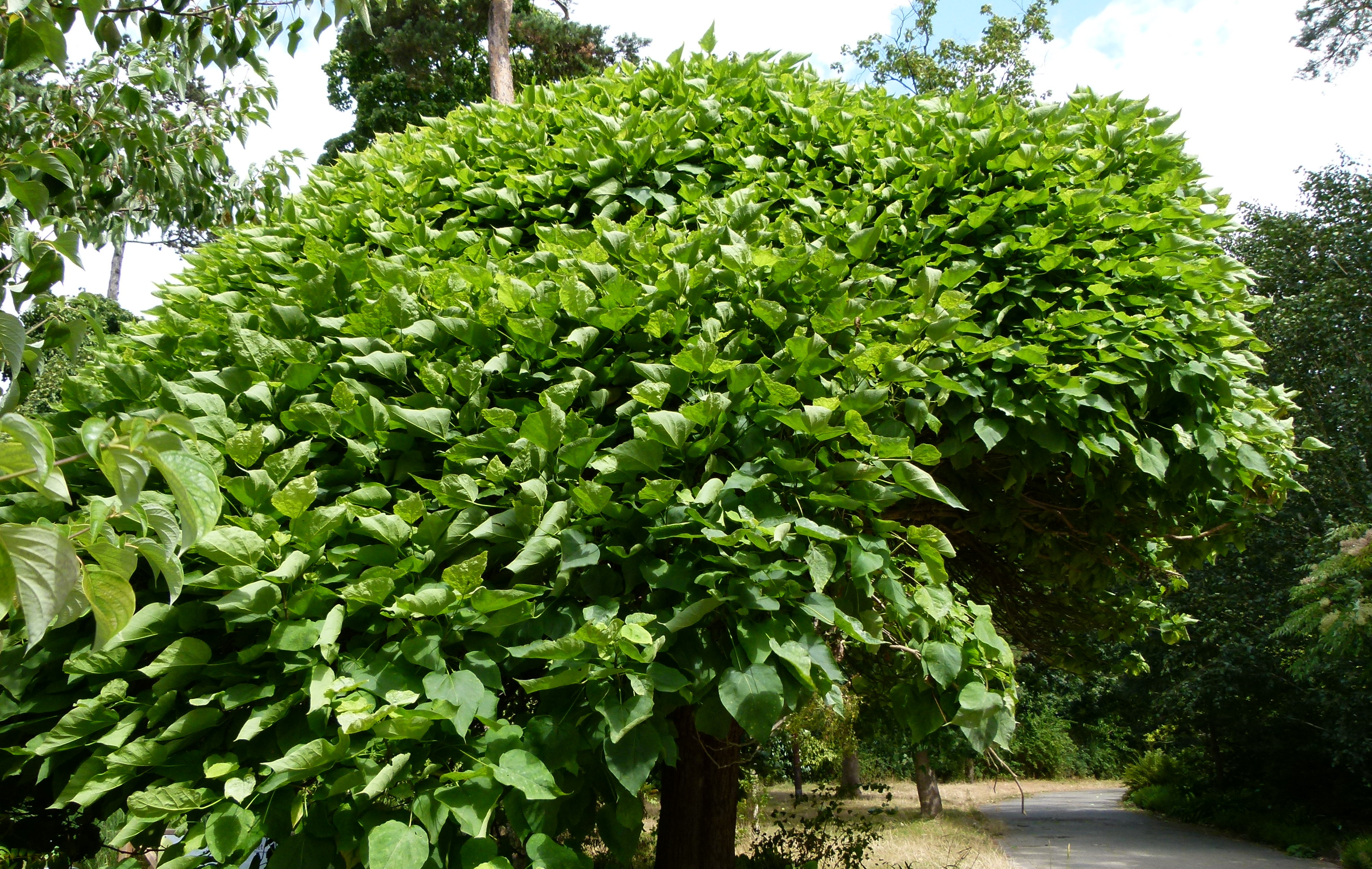 Catalpa bignonioides "Nana"